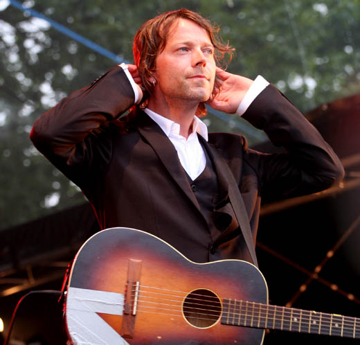 Magnet (Even Johansen) during 'Skral Festival' in Grimstad, Norway